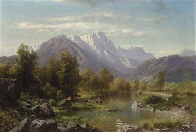 Karl Millner: Berglandschaft. Ölgemälde